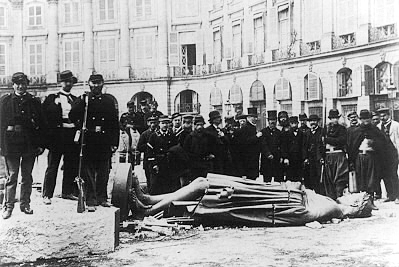 sturz der Colonne vendome durch die Pariser Commune 1871